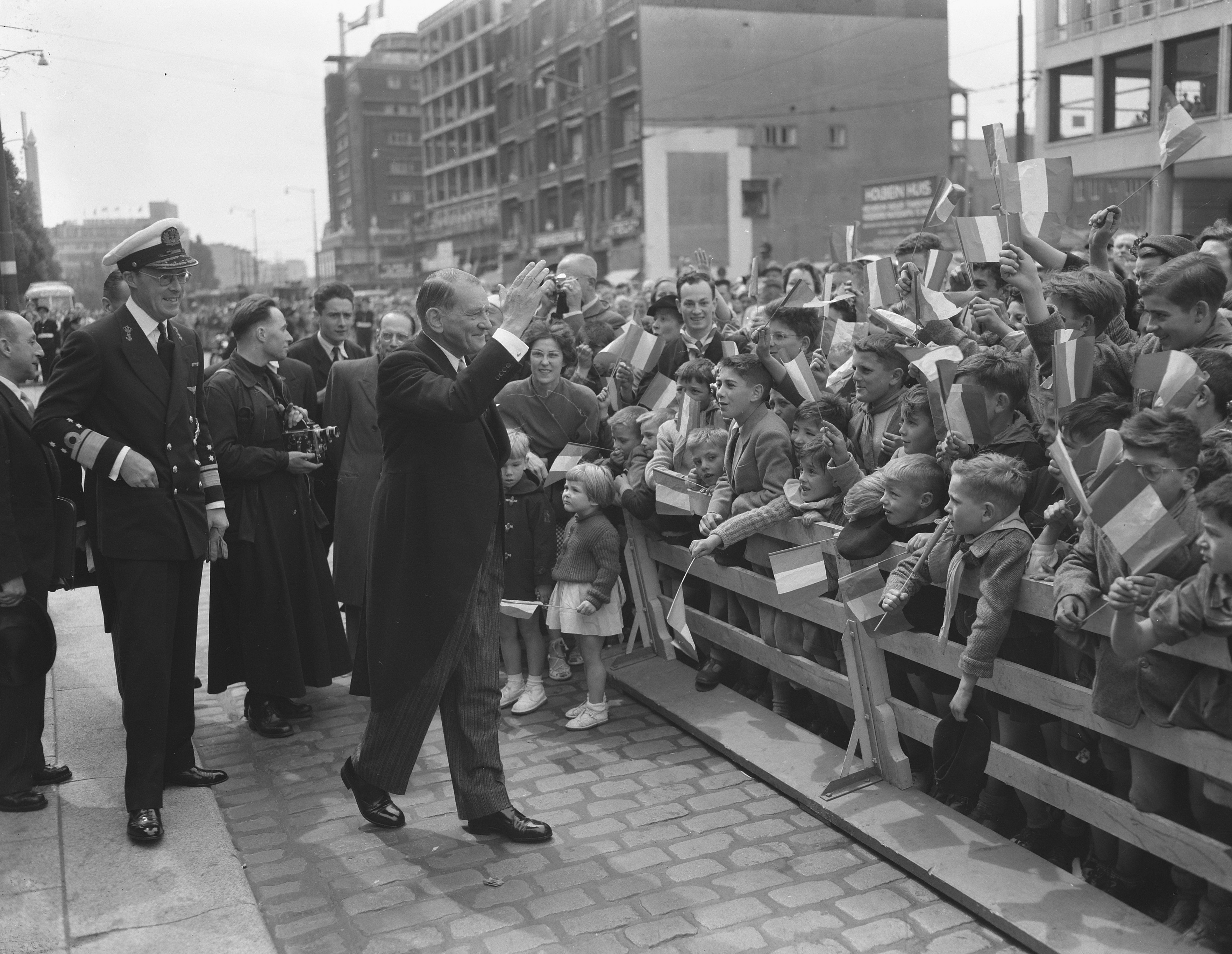 Collectie / Archief : Fotocollectie Anefo Reportage / Serie : [ onbekend ] Beschrijving : Staatsbezoek Franse president Coty aan Nederland. Derde dag. Rotterdam. Coty groet juichende kindertjes Datum : 23 juli 1954 Locatie : Rotterdam, Zuid-Holland Trefwoorden : boottochten, kinderen, presidenten, staatsbezoeken Persoonsnaam : Coty, R. Fotograaf : Noske, J.D. / Anefo Auteursrechthebbende : Nationaal Archief Materiaalsoort : Negatief (zwart/wit) Nummer archiefinventaris : bekijk toegang 2.24.01.04 Bestanddeelnummer : 906-6161